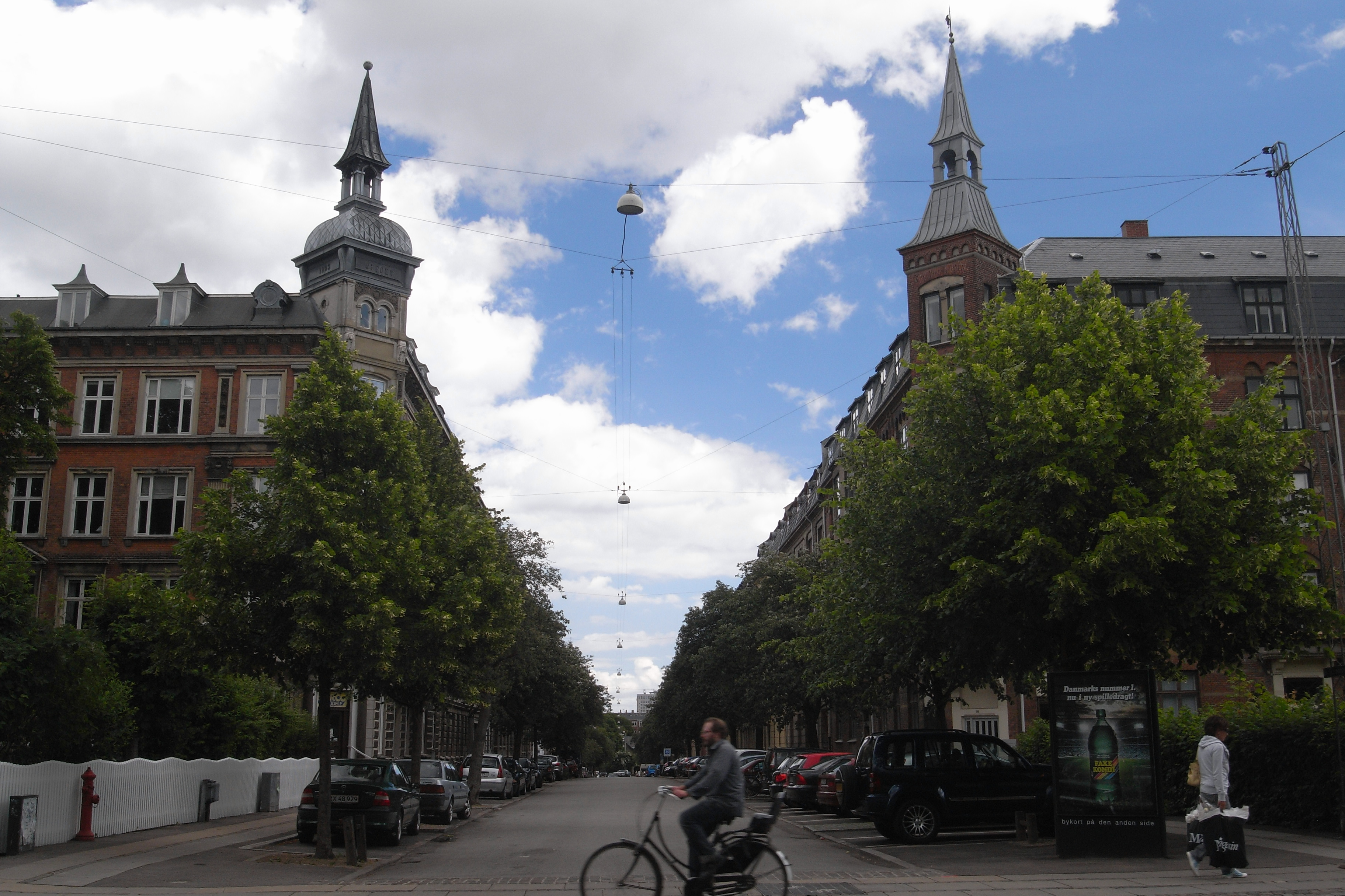 A view down Hollændervej from Allégade in the Frederiksberg district of Copenhagen, Denmark